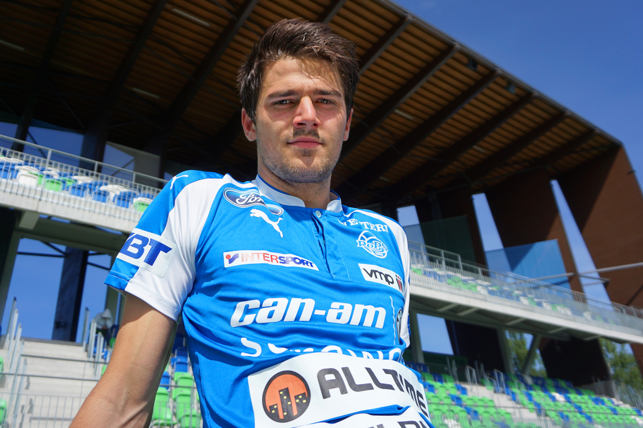 Charlie Trafford Rovaniemen Palloseura, heinäkuu 2017.